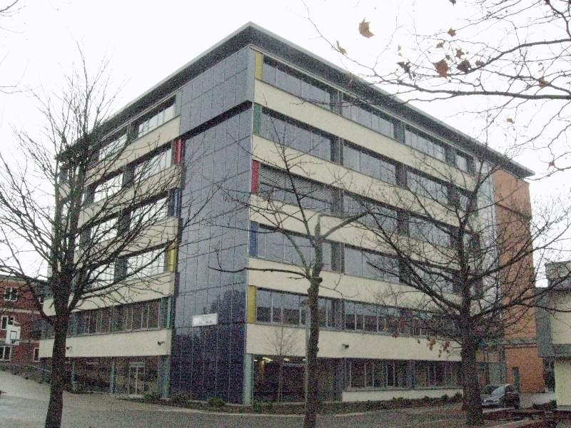 Solarfassadenelement Gumboldt-Schule Bad Homburg vdH